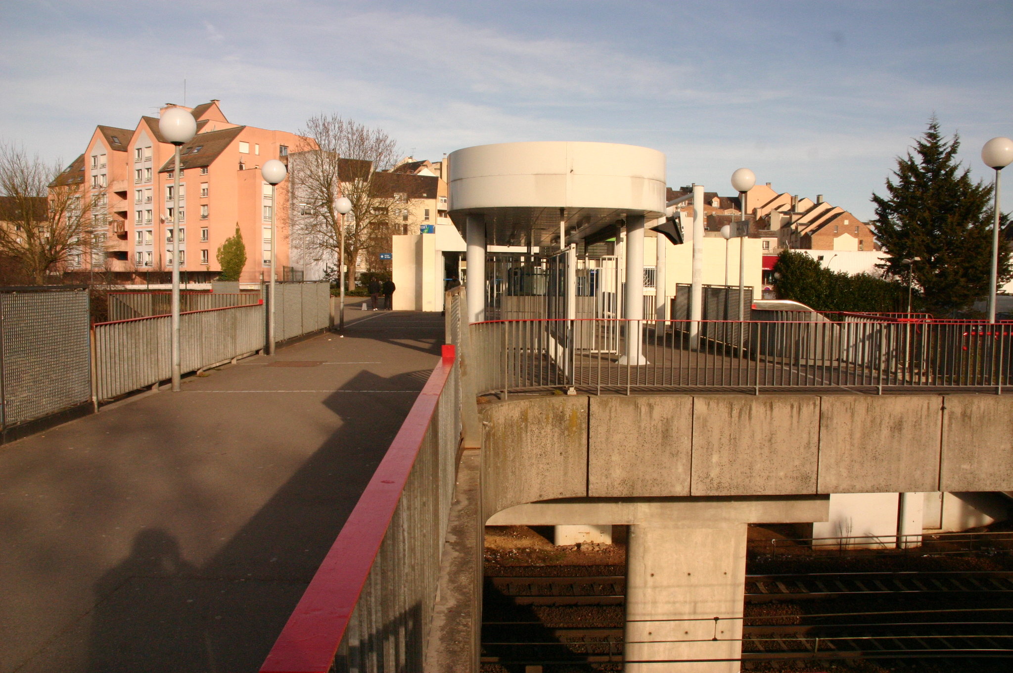 La Gare de Le Mée, Le Mée-sur-Seine , département de la Seine-et-Marne, France